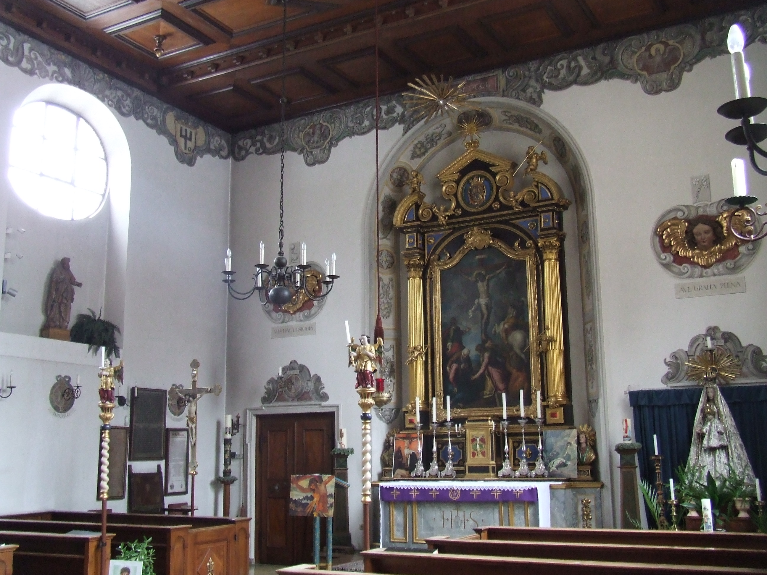 Augsburg, Fuggerei, Markuskirche, innen